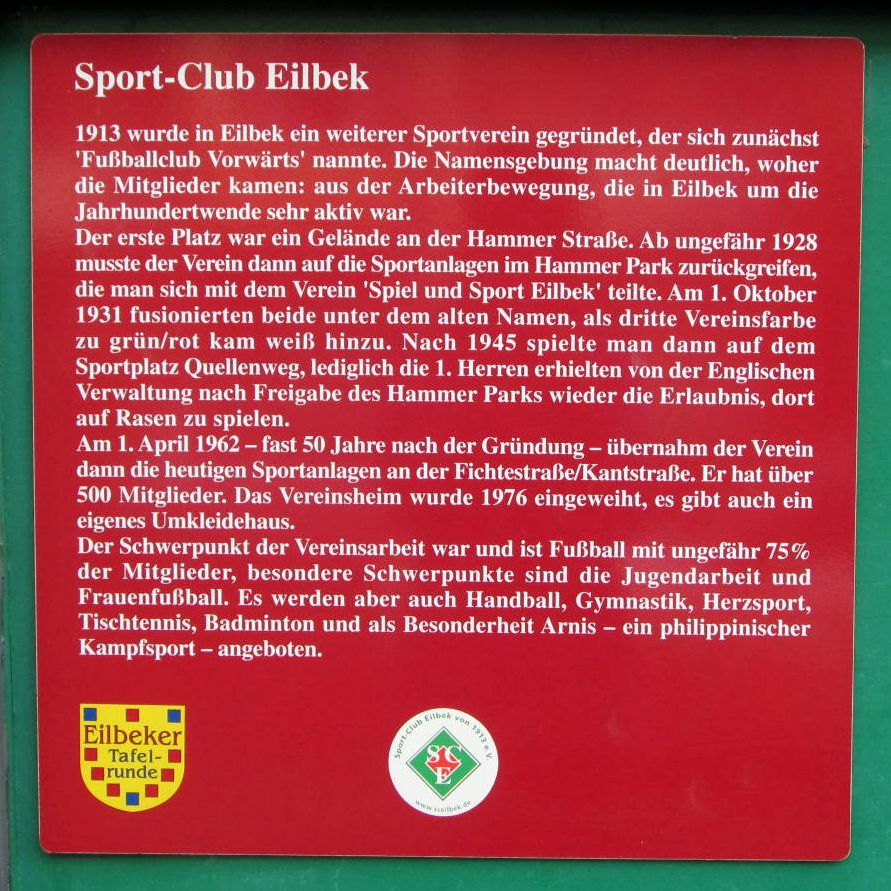 Geschichtstafel der "Eilbeker Tafelrunde" über den Sport-Club Eilbek, am Vereinsheim in der Fichtestraße in Hamburg-Eilbek